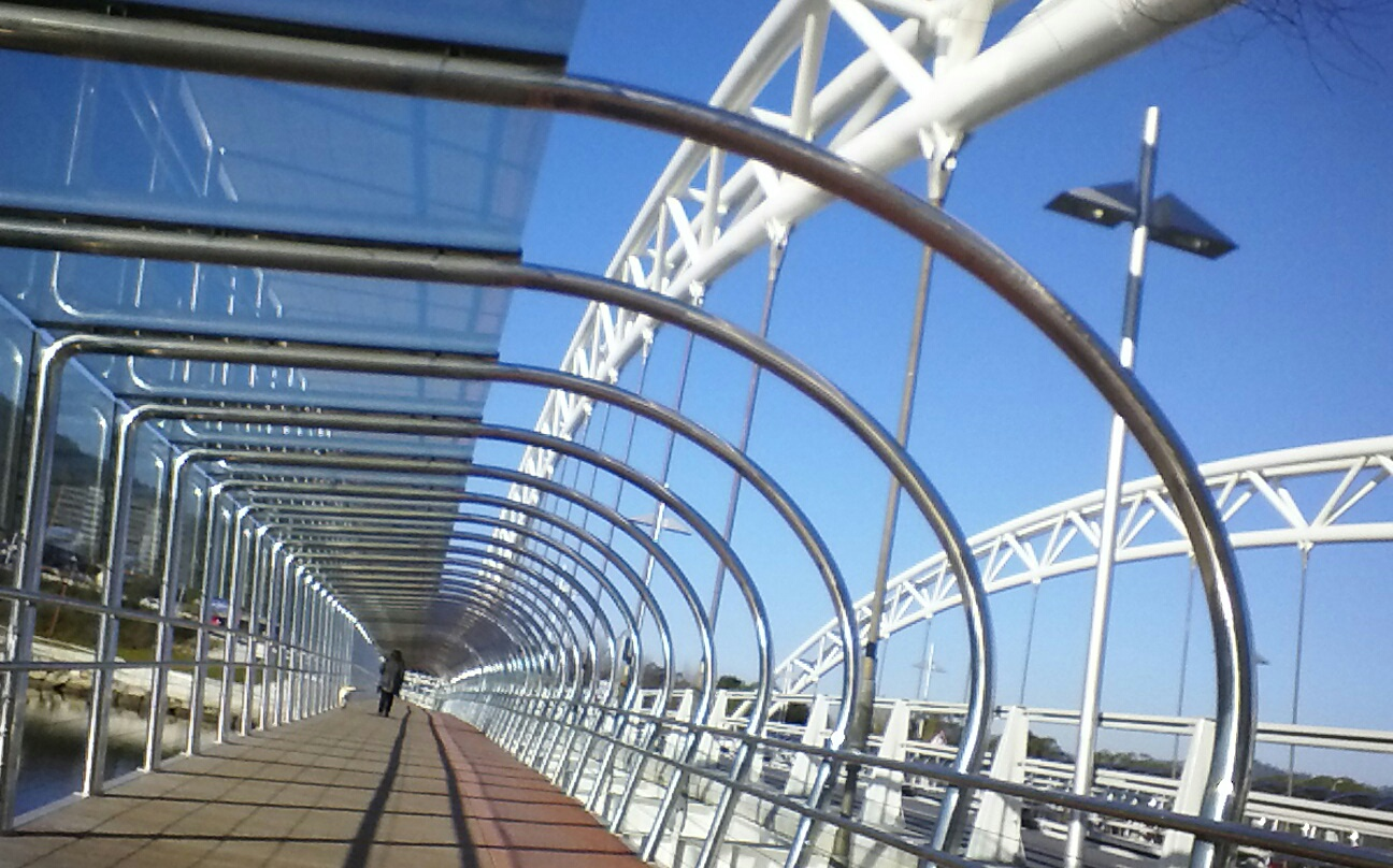 Puente de las Corrientes interior, Pontevedra Capital. Inaugurado en el año 2012